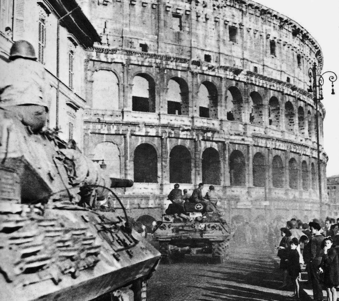 Colonna di Tank Destroyers M10 americani in movimento accanto al Colosseo a Roma il 5 giugno 1944